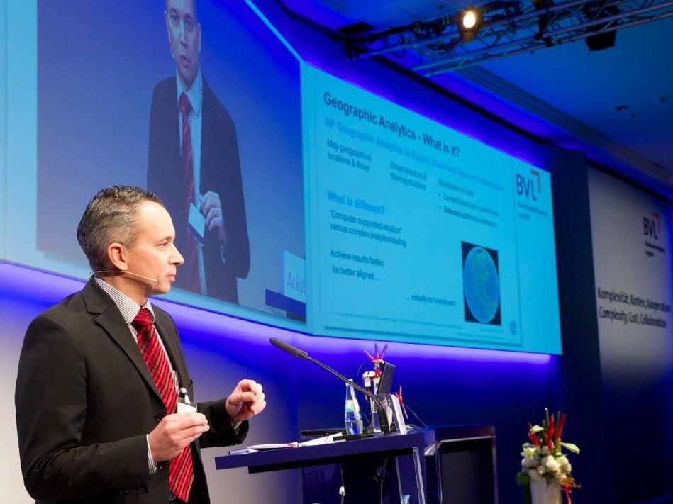 Prof. Acksteiner auf dem BVL Logistik Kongress